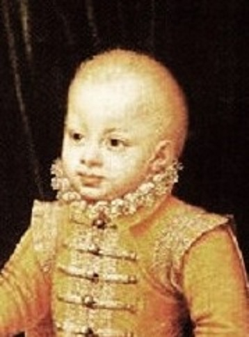 ймовірний портрет Карла Лоренцо Габсбурга